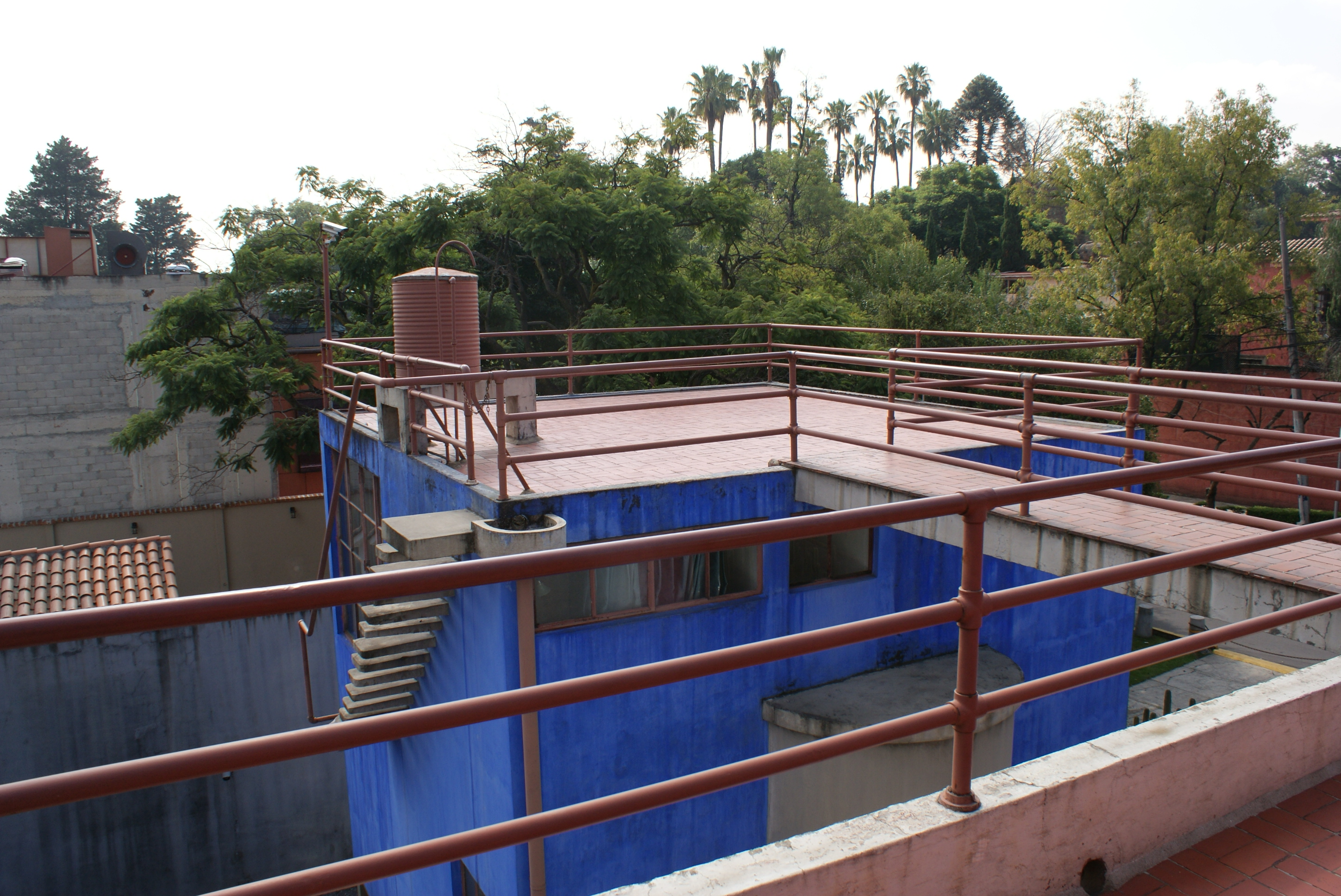 Fotografía tomada en el Museo Casa Estudio Diego Rivera y Frida Kahlo desde la azotea de la casa de Diego Rivera. Las casas están unidas por un pasillo puente, que une ambas azoteas.